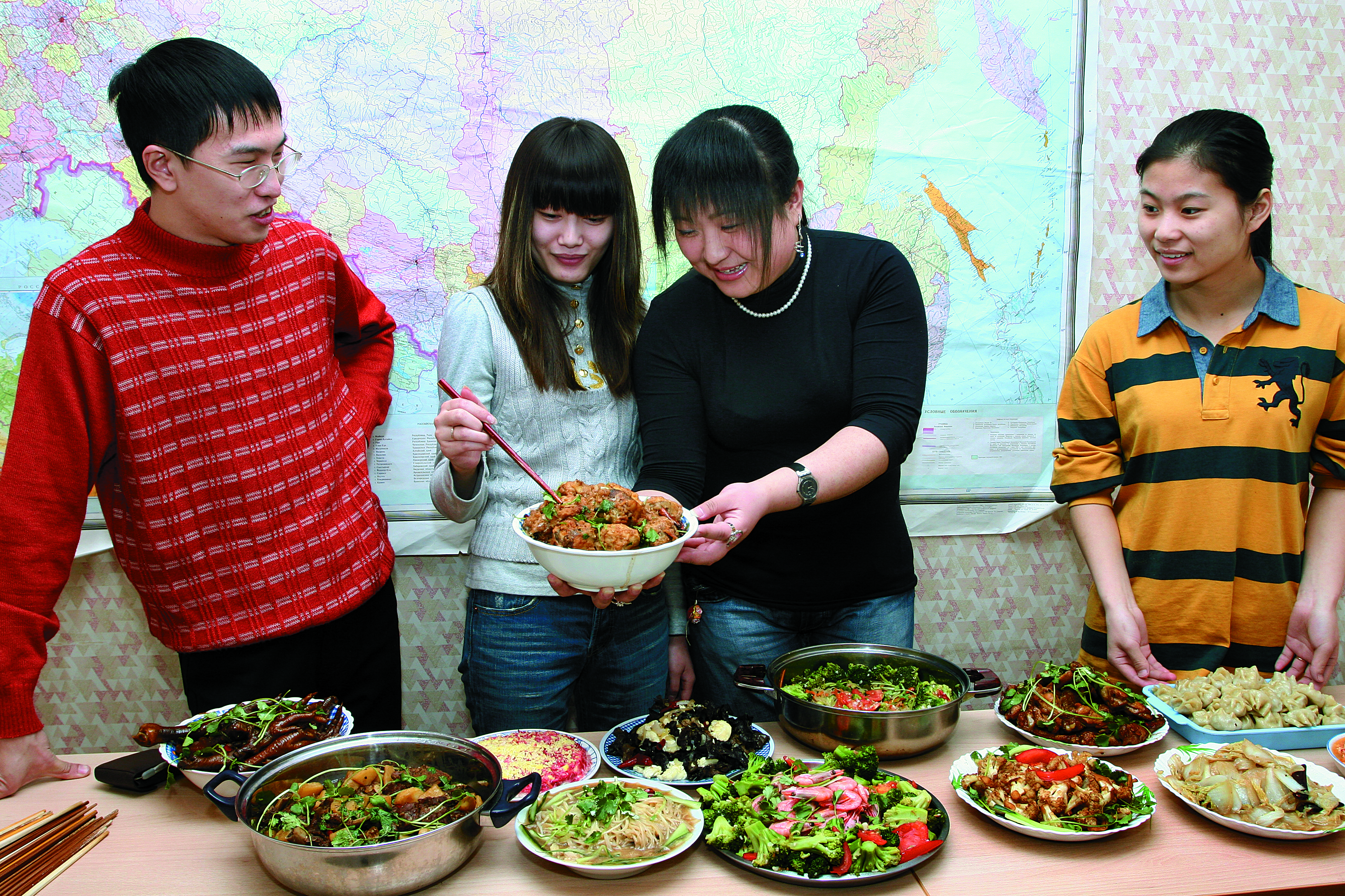 Делегация КНР в НГУЭУ